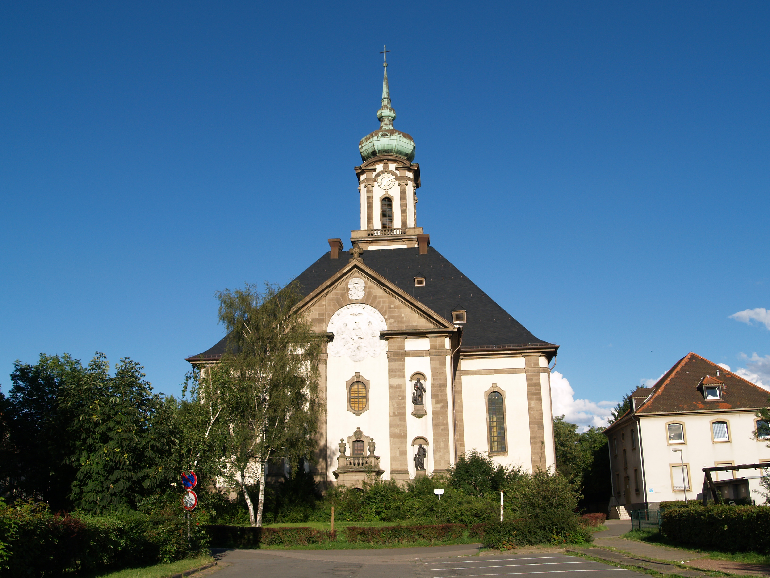 Vesöhnungskirche Völklingen (Poststraße)